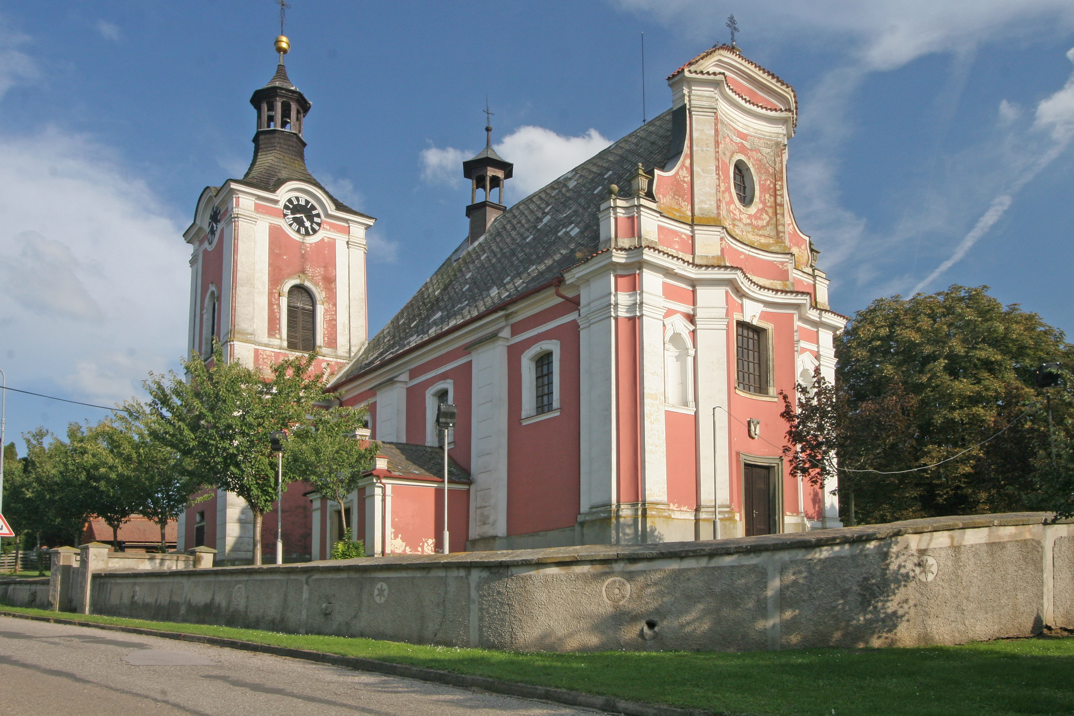 Kostel Nanebevzetí P. Marie (Petrovice), Petrovice